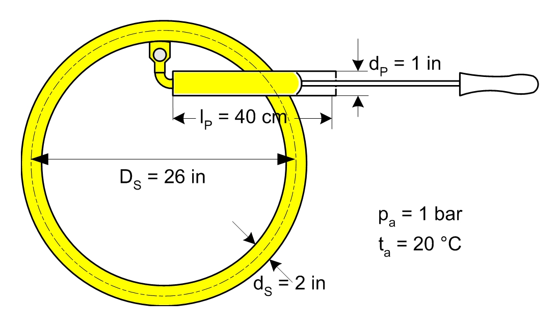 Aufpumpen eines Rahrradreifens